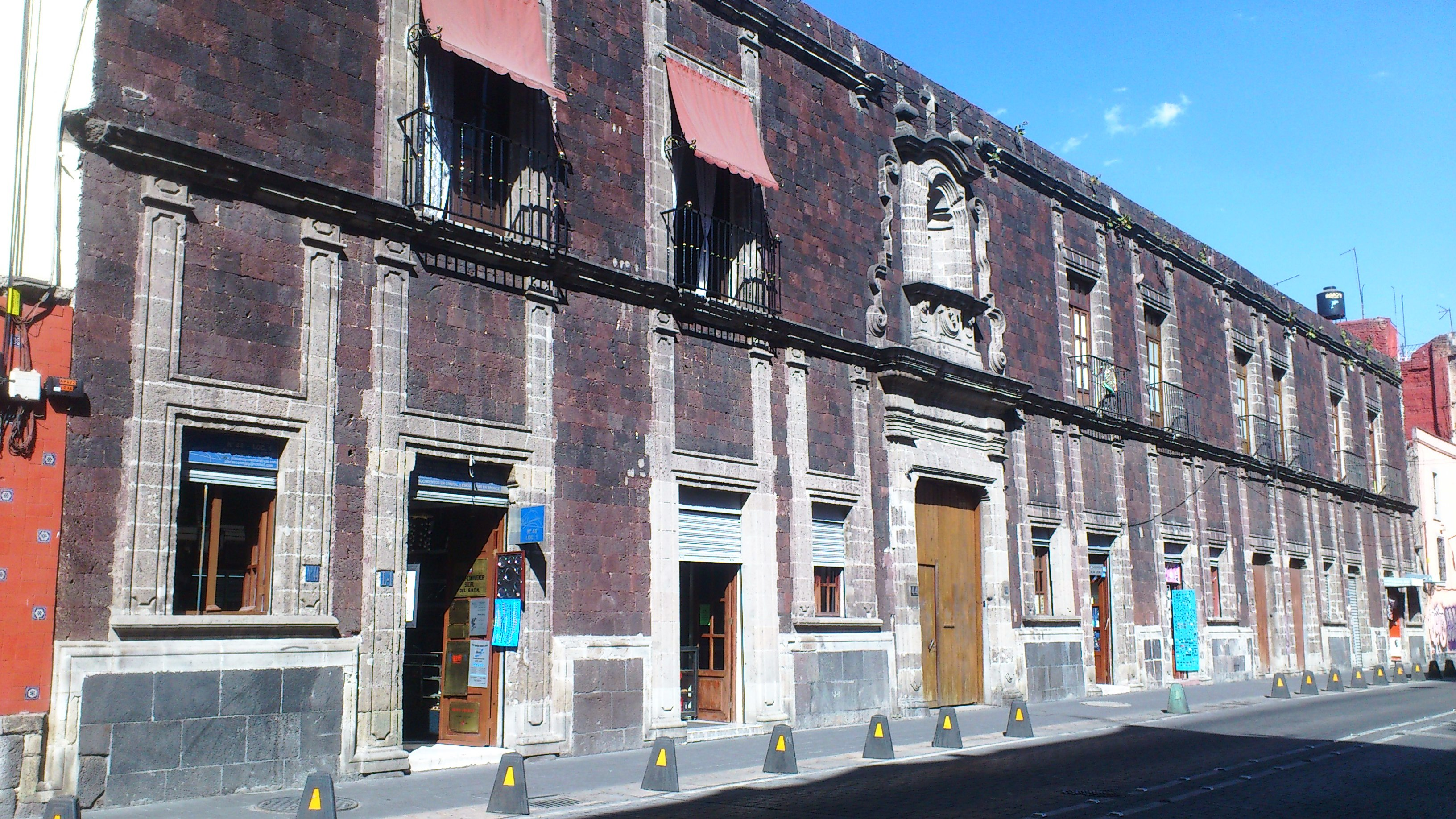 Casa de la Covadonga en el centro histórico de la Ciudad de México, en la calle Belisario Dominguez 44